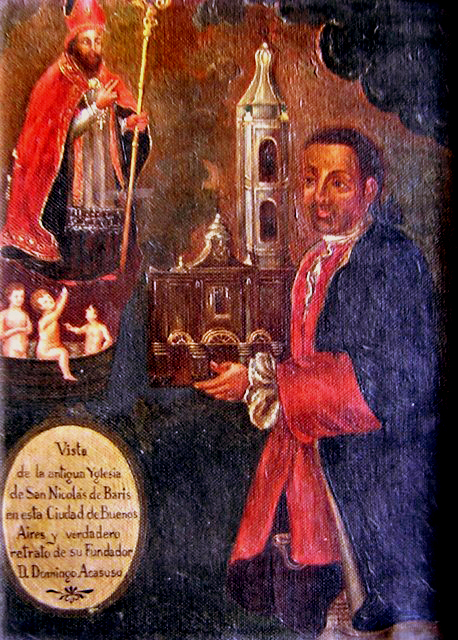 Retrato de Domingo de Acassuso (1658-1727) militar español. Sirvió en Buenos Aires durante el Virreinato del Perú.